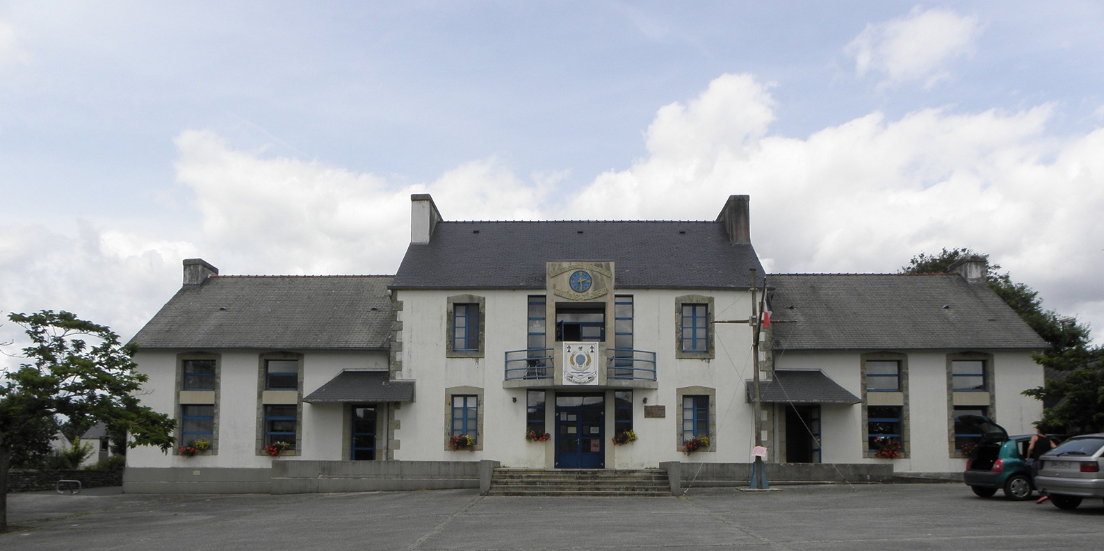 Mairie de Saint-Coulitz (29).